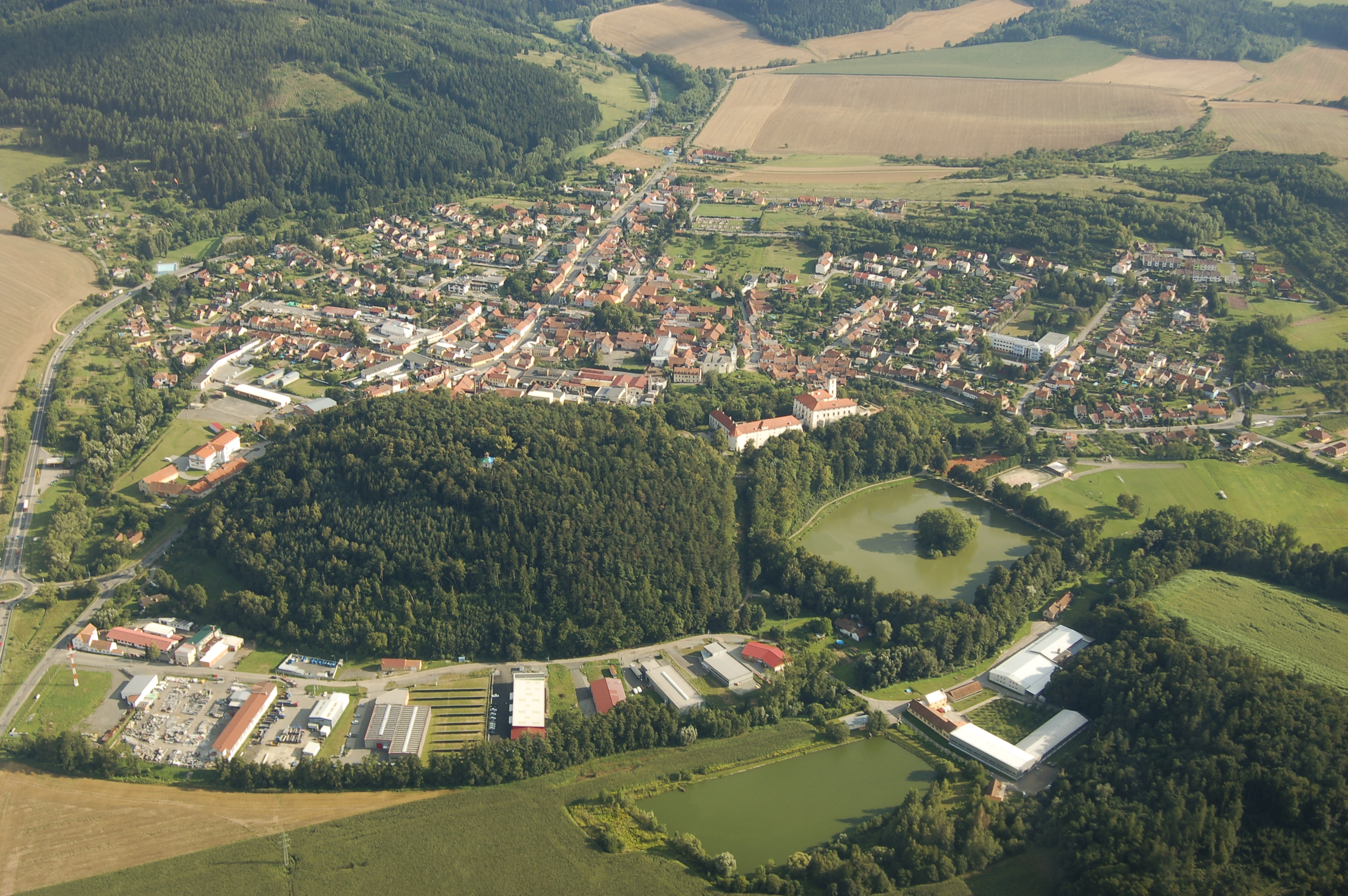 Letecký snímek Černé Hory (okres Blansko)